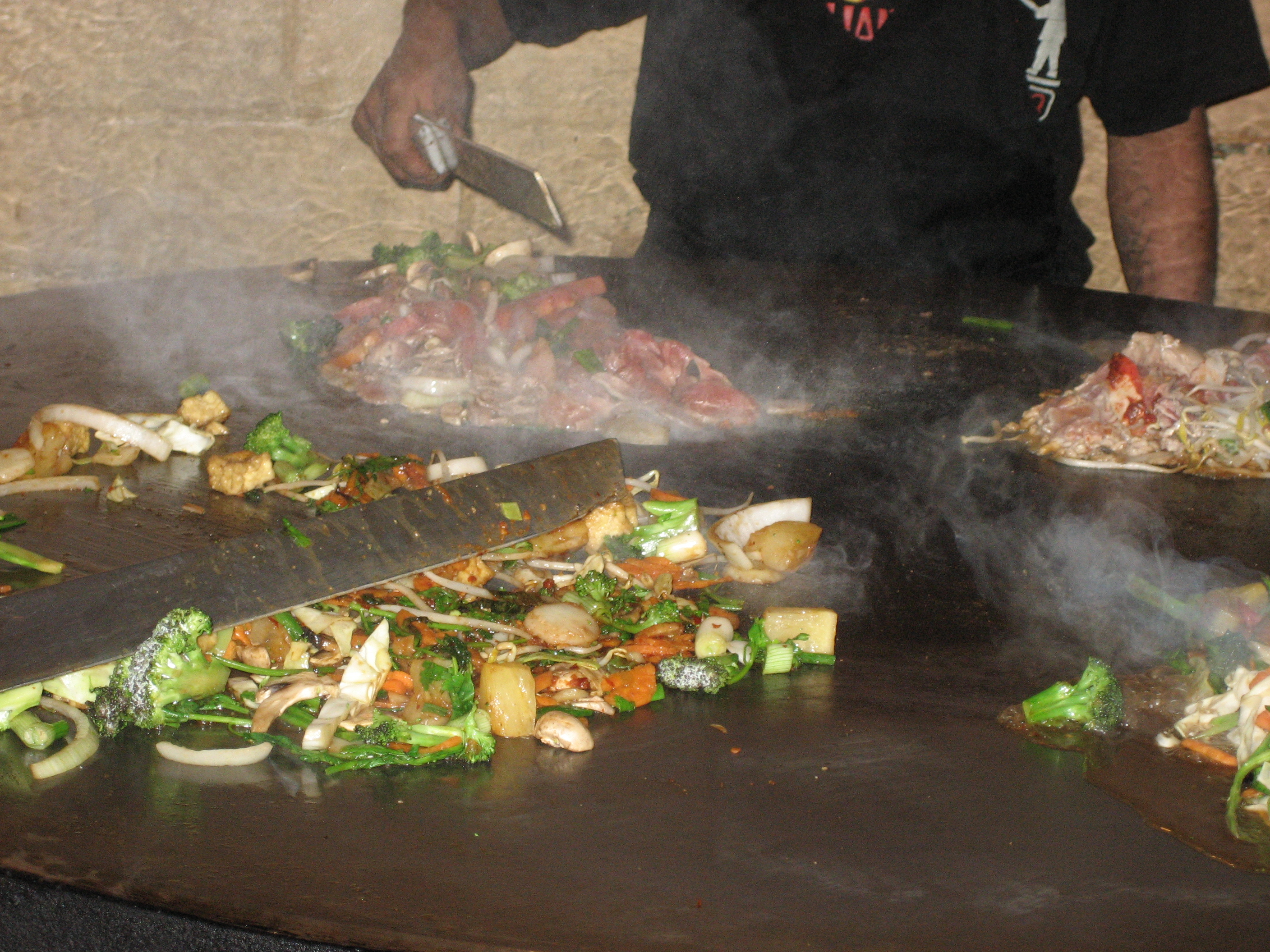 Mongolian barbeque